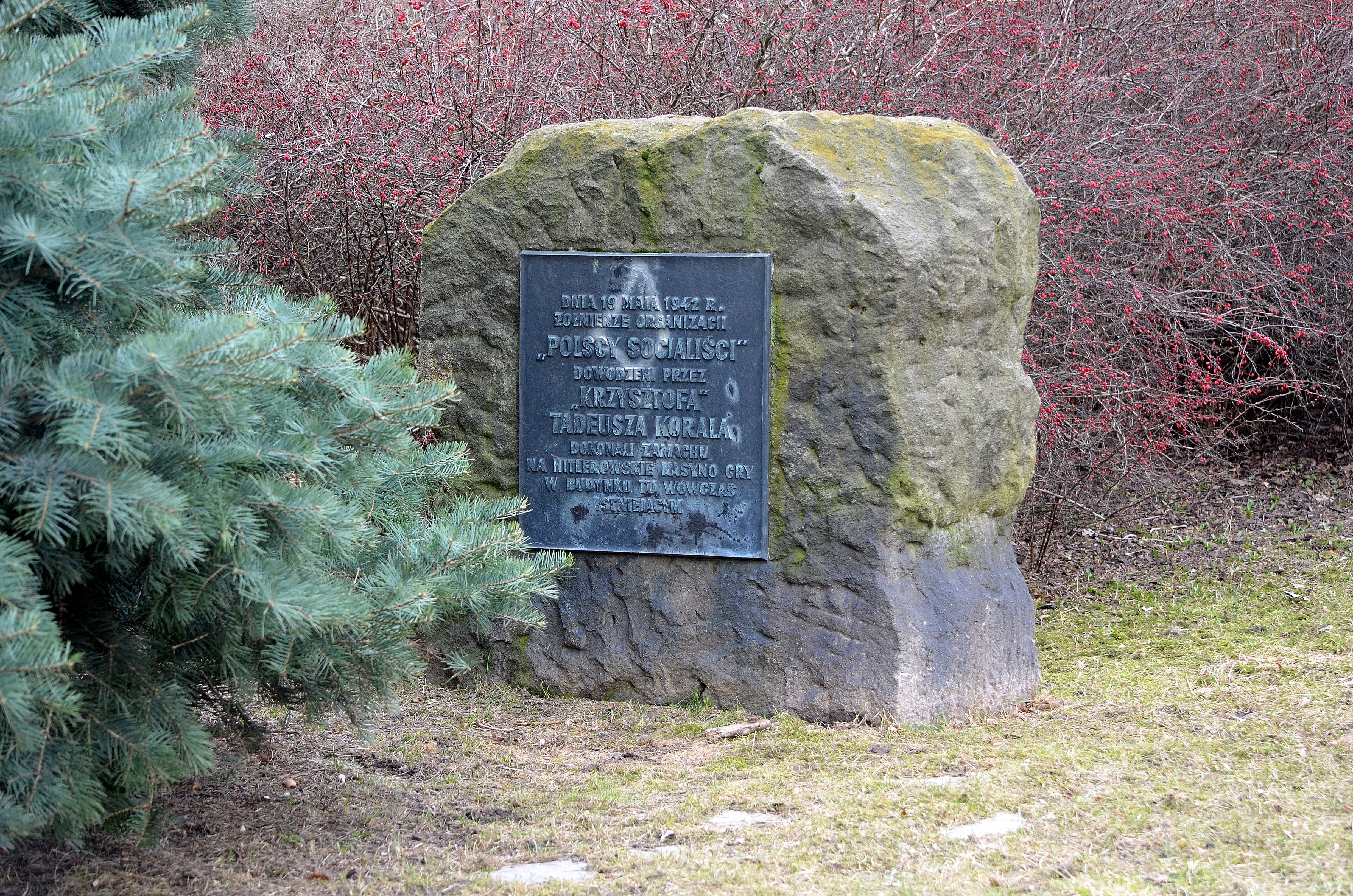 Kamień upamiętniający zamach Polskich Socjalistów na kasyno w alei J.Ch. Szucha 29